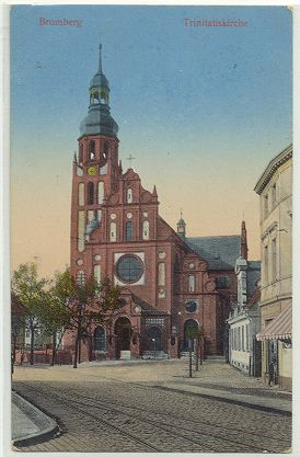 Ulica Świętej Trójcy w Bydgoszczy (1917)